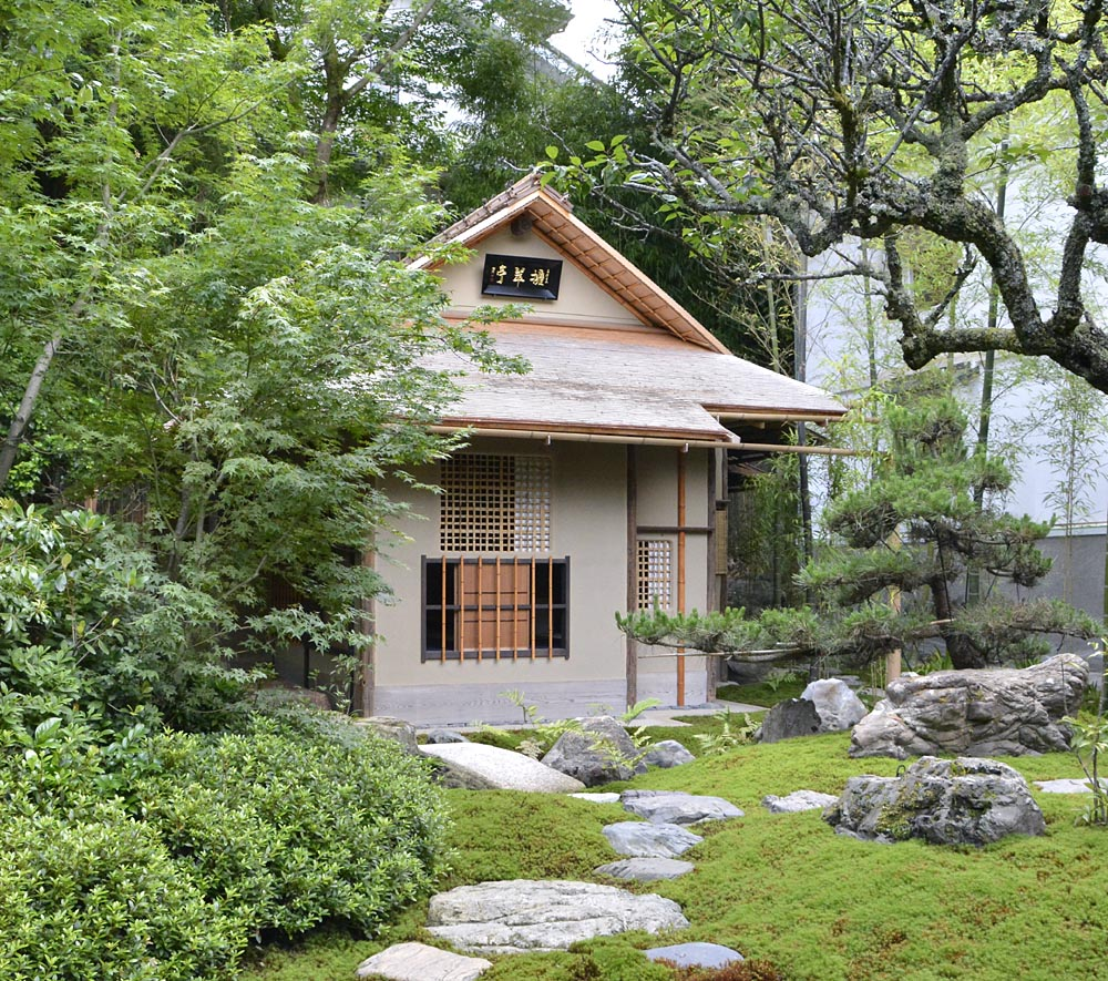 京都市北区鷹峯にある「太閤山荘」内に140年ぶりに移築された、小堀遠州作の茶室「擁翠亭」